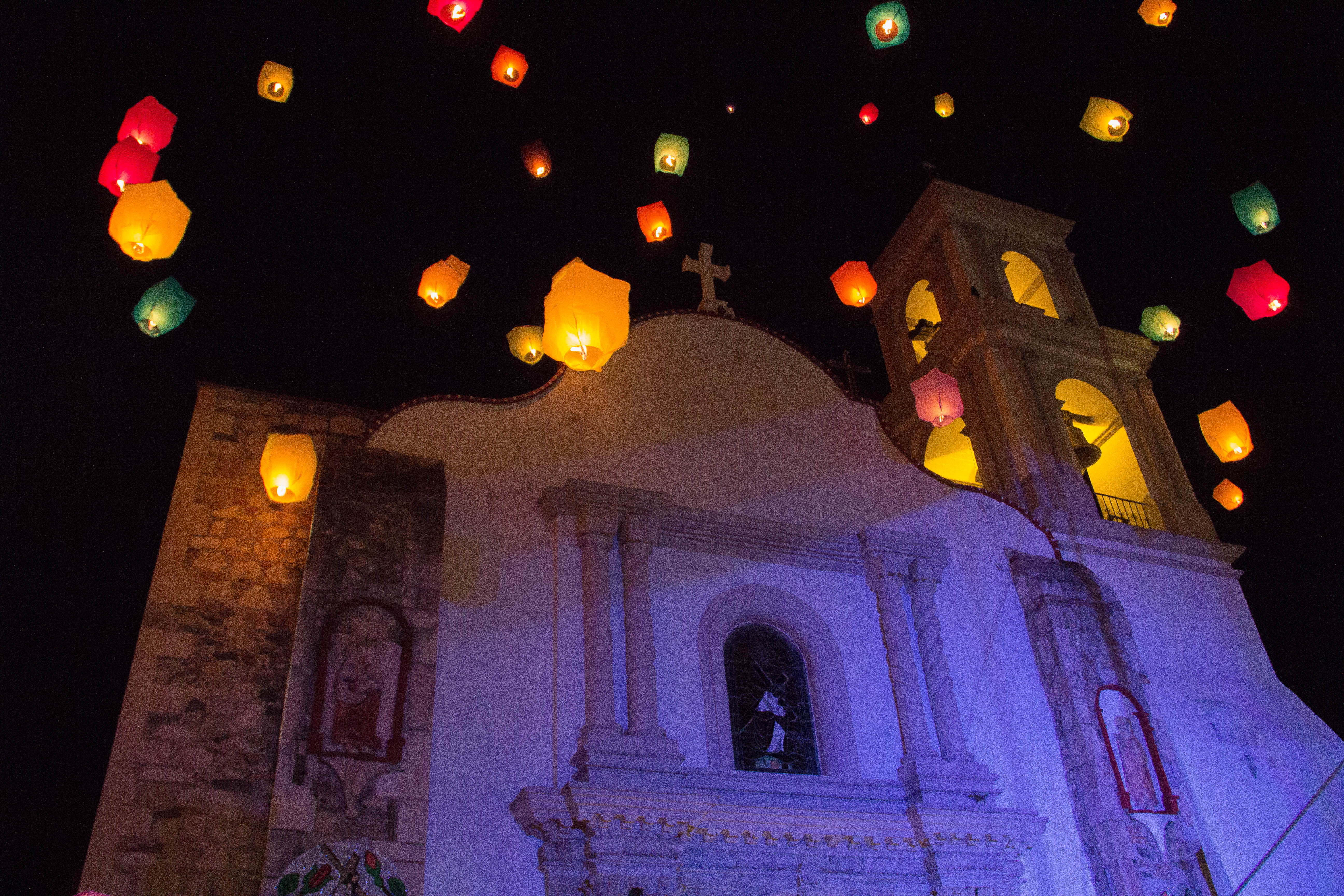 Lanzamiento de globos de Cantoya por parte de Siente China en el Municipio de Almoloya de Alquisiras.